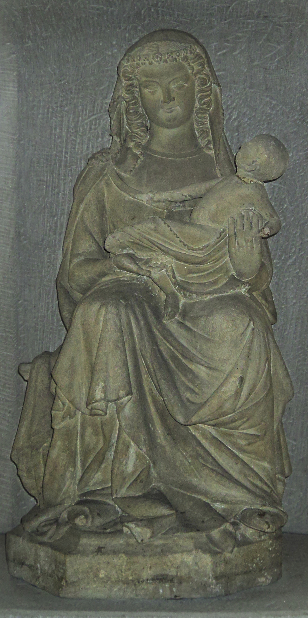 Lächelnde Madonna, Sandsteinskulptur, um 1260, Künstler unbekannt, Kirche Johannes Enthauptung in Lauter (Burkardroth).